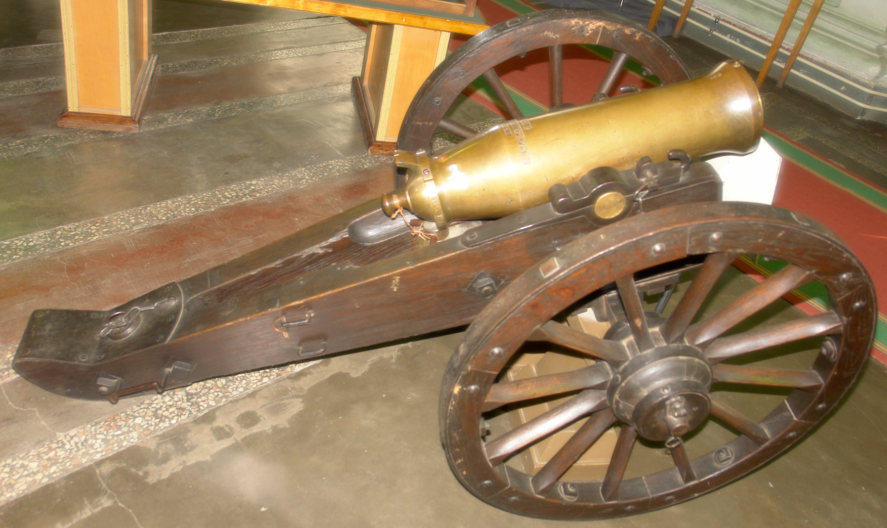 1/4 пудовый (122-мм) горный единорог образца 1838 года. Бронзовый ствол, 69,5.см длиной. Вес 100 кг, отлит в 1853 году в Санкт-Петербурге (Иоганни). Дальность - 1800 м. Военно-исторический музей артиллерии, инженерных войск и войск связи, Санкт-Петербург.